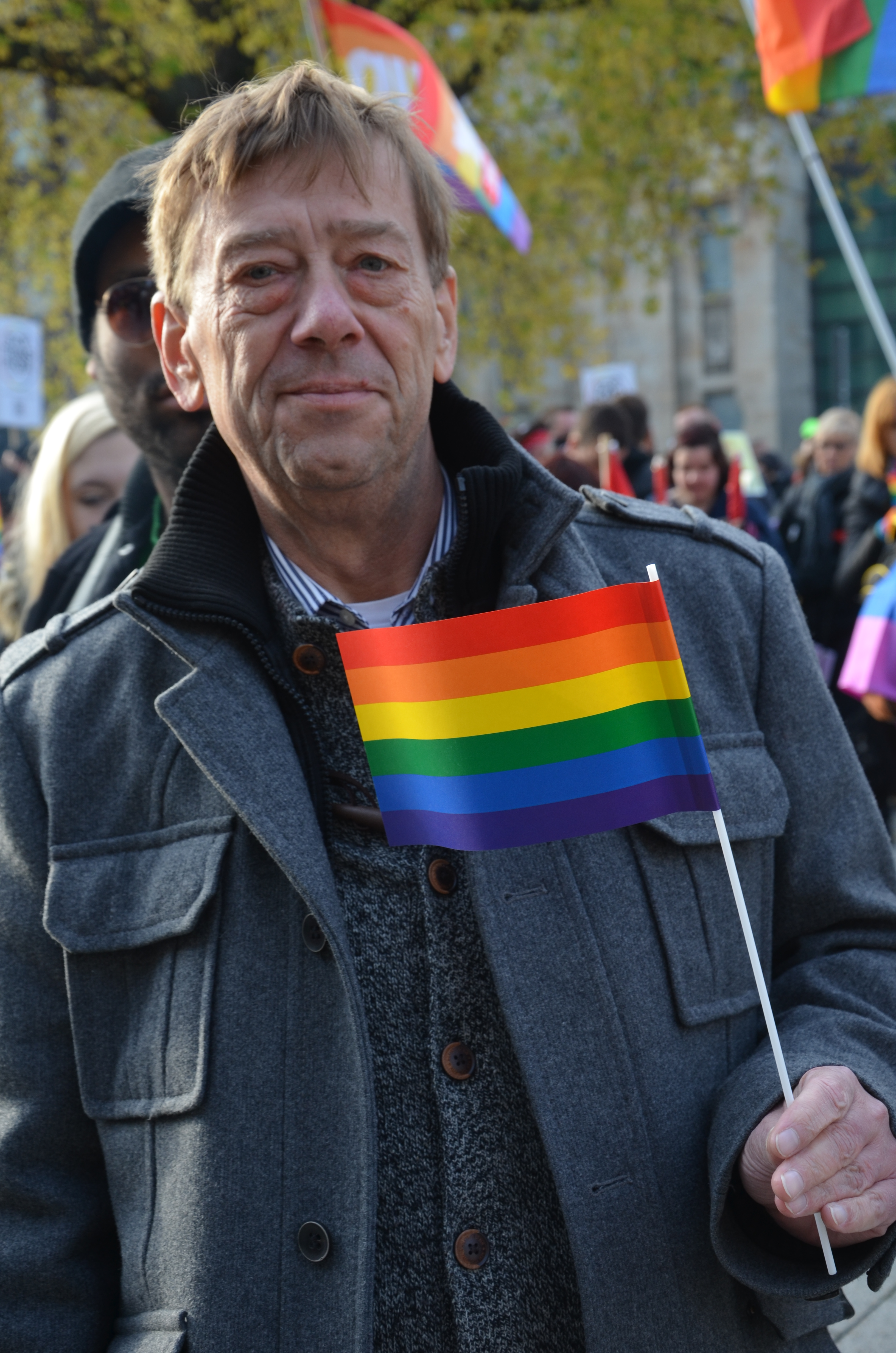 Zu der Kundgebung unter dem Motto Vielfalt statt Einfalt, zu der sich bundesweit mehr als 40 Organisationen, Gruppen und Einzelpersonen zusammengefunden haben, fand am 22. November 2014 auf dem Platz der Goseriede in Hannover eine bunte Kundgebung statt. Mehrere hundert Menschen hatten sich zusammengefunden mit dem Ziel, das Schwule, Lesben, Trans- und Intersexuelle Menschen zukünftig keine Ausgrenzung mehr erfahren, sondern in ihrer freien Persönlichkeitsentwicklung schon durch den Schulunterricht frühzeitig gefördert werden. Bereits am Vortag der Kundgebung hatte die Stadt Hannover den nahegelegenen Platz Am Steintor, auf dem am selben Tag eine weitere, sogenannte Demo für alle startete, zahlreiche Regenbogenfahnen hochgezogen als für alle sichtbares Zeichen der Bereicherungen des gemeinschaftlichen Zusammenlebens und -arbeitens vielfältiger Identitäten und Kulturen in der niedersächsischen Landeshauptstadt ...